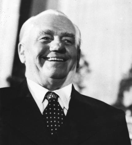 Title: Berlin, DDR-Gründung, Wahl Pieck; Grotewohl People in the image: Pieck, Wilhelm (Präsident, Politbüro der SED, Vorsitzender der KPD), DDR (GND 118594273) * Grotewohl, Otto (Ministerpräsident, stellvertretender Staatsratsvorsitzender), DDR (GND 118542680) Factual corrections and alternative descriptions are encouraged separately from the original description. Additionally errors can be reported at this page to inform the Bundesarchiv. Original historic description: Zentralbild/Zühlsdorf Gründung der Deutschen Demokratischen Republik am 7.10.1949 Im Gebäude der DWK (Deutsche Wirtschafts Kommission) in Berlin Leipziger Straße wählten am 11. Oktober 1949 die Provisorische Länderkammer und die Provisorische Volkskammer einstimmig Wilhelm Pieck zum Staatspräsidenten der Deutschen Demokratischen Republik. UBz: Staatspräsident Wilhelm Pieck (l.) und Ministerpräsident Otto Grotewohl.